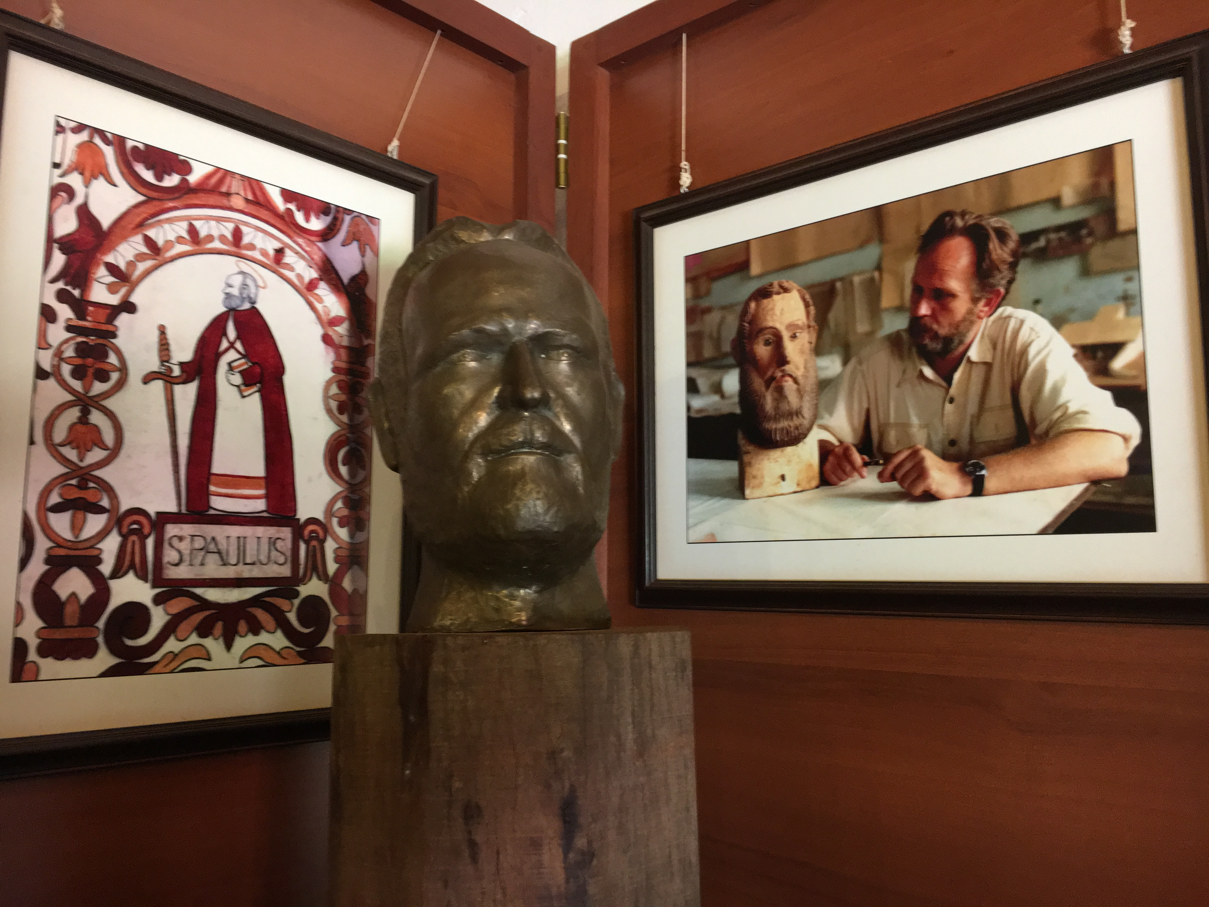 Homaneje al arquitecto suizo en el Salón que lleva su nombre del Museo Misional de Concepción (Bolivia)